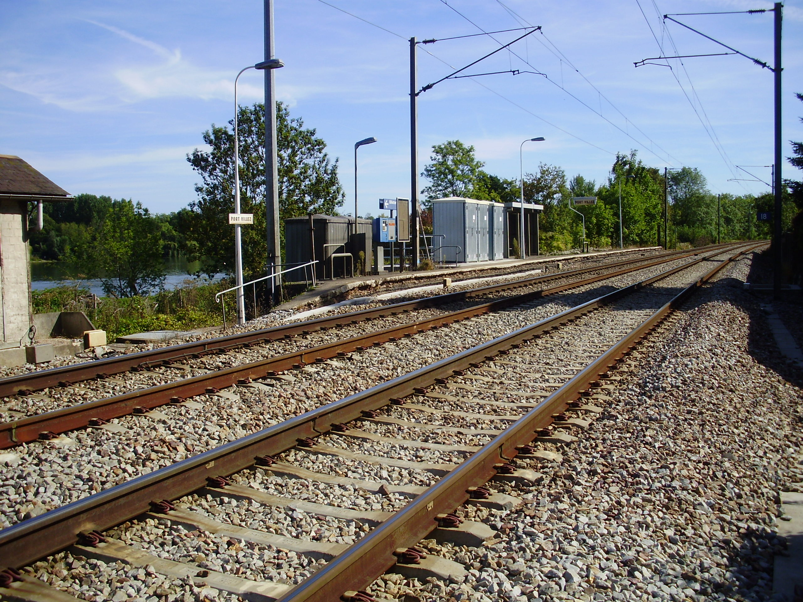 Gare de Port-Villez, Yvelines, France (vue de l'ex-quai pour Mantes-la-Jolie / Paris depuis le passage à niveau)